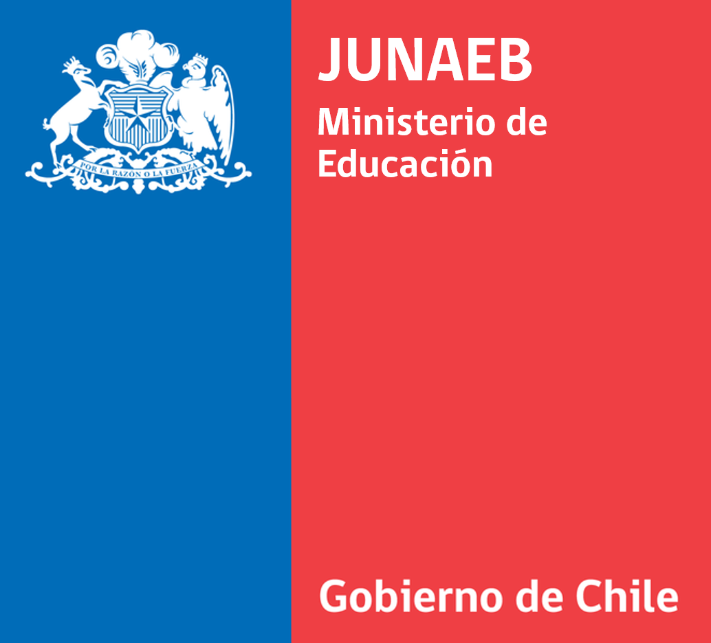 Logo de la Junta Nacional de Auxilio Escolar y Becas del Ministerio de Educacion